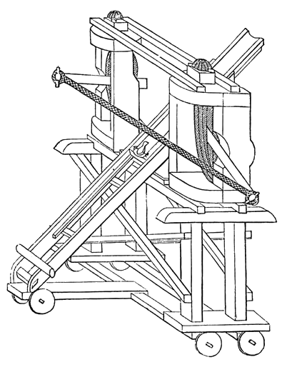 Balliste